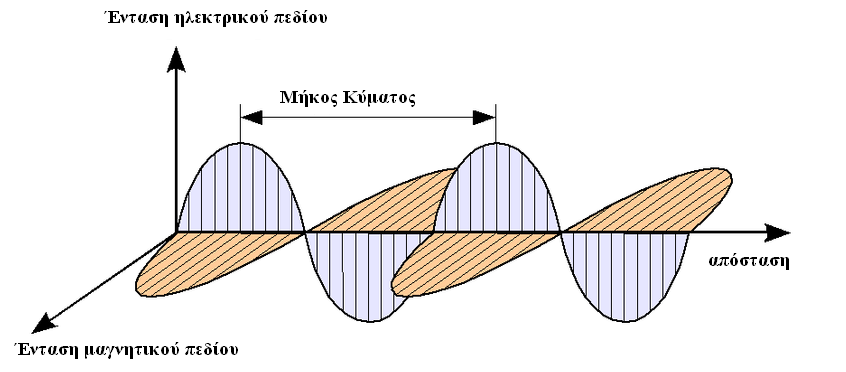 Διάγραμμα ηλεκτρομαγνητικού κύματος